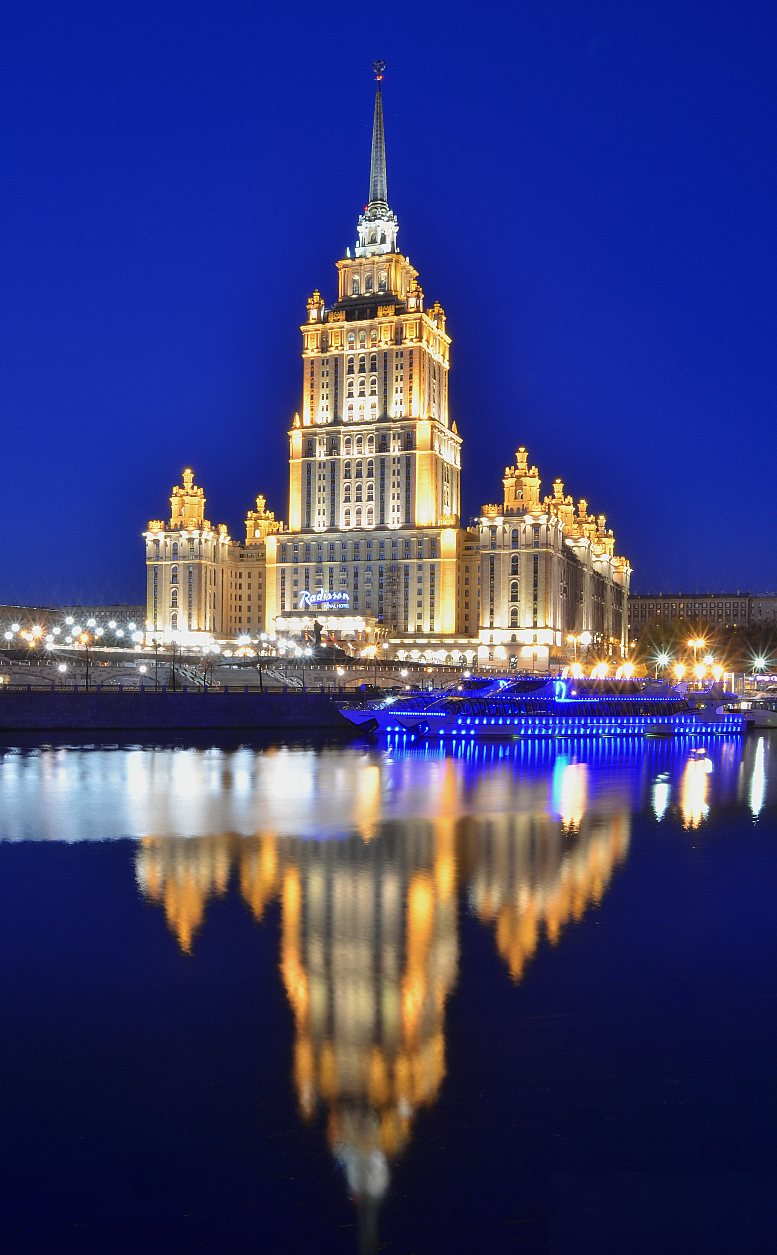 Можно увидеть здесь